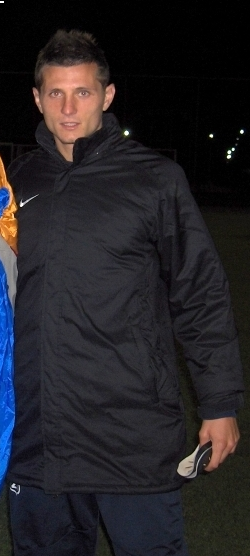 Cyril Théréau